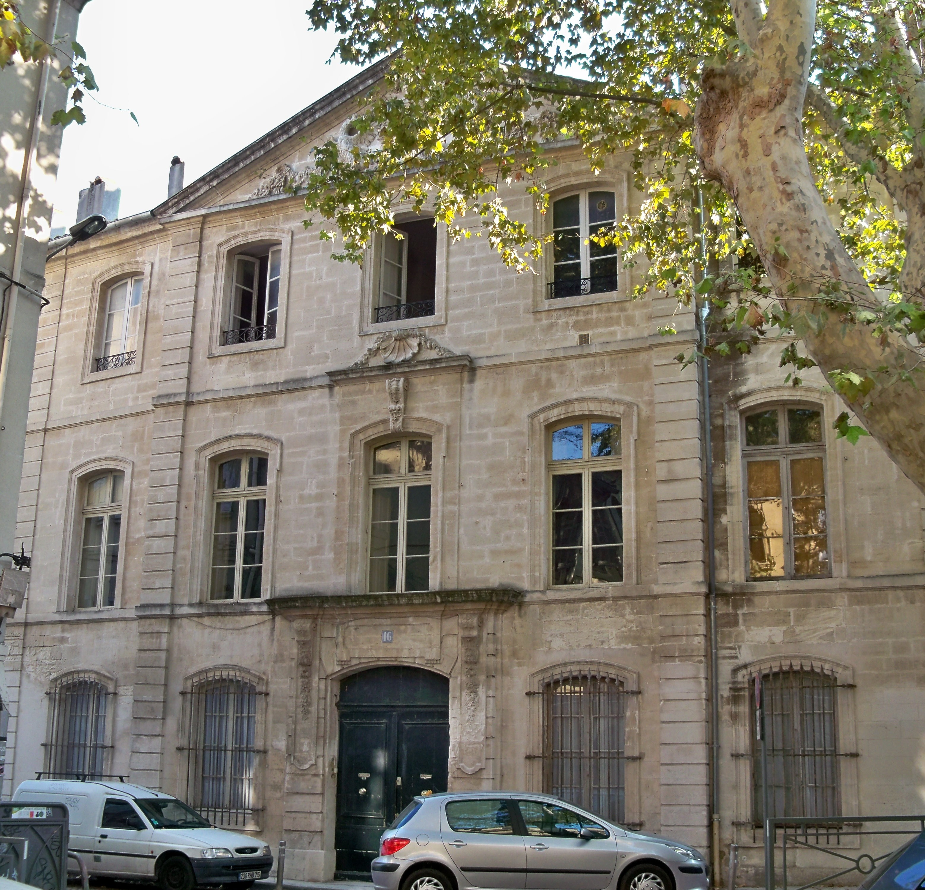 Hotel de la Bastide à Avignon (84) .